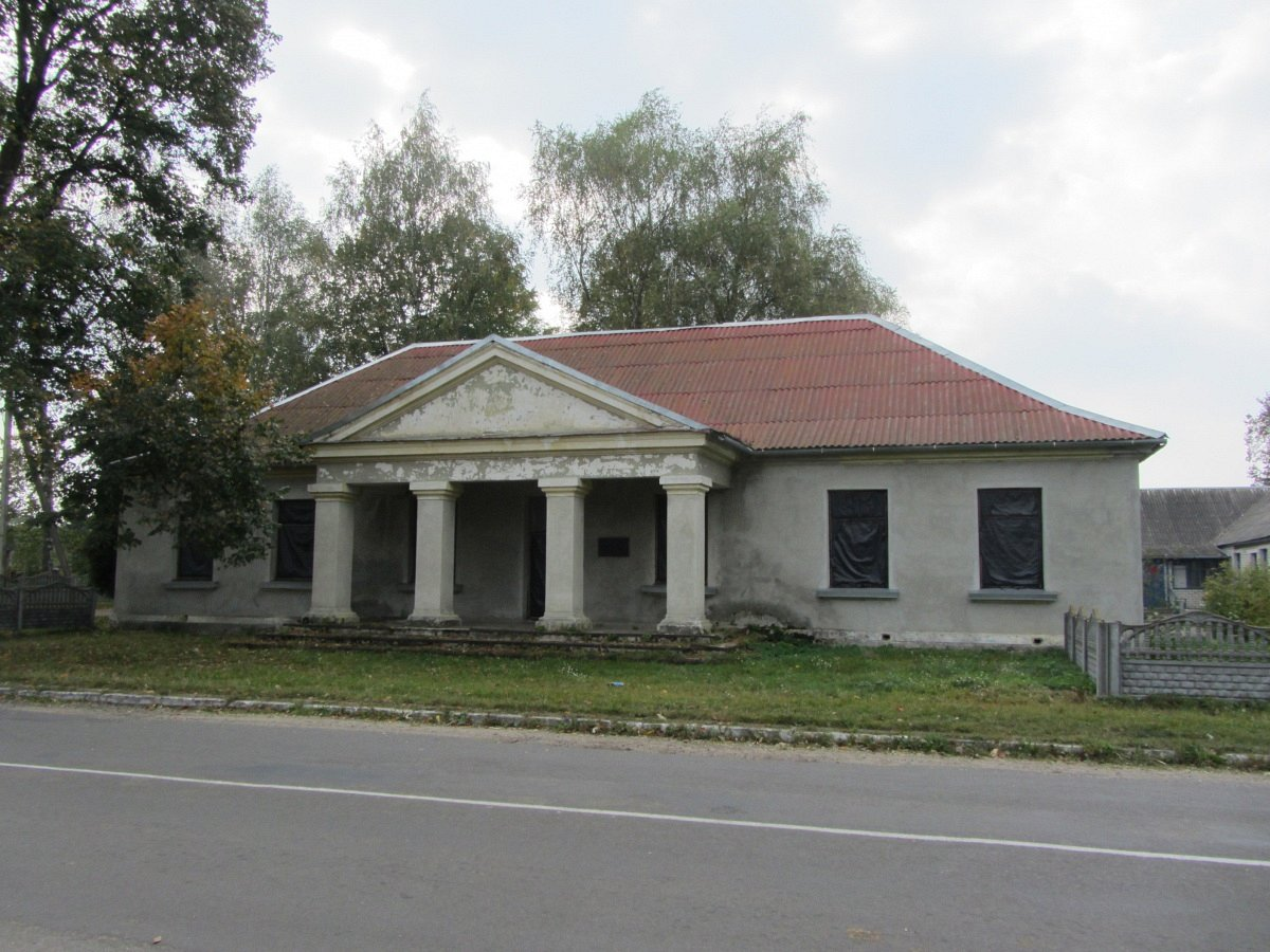 Краявіды Воўчына